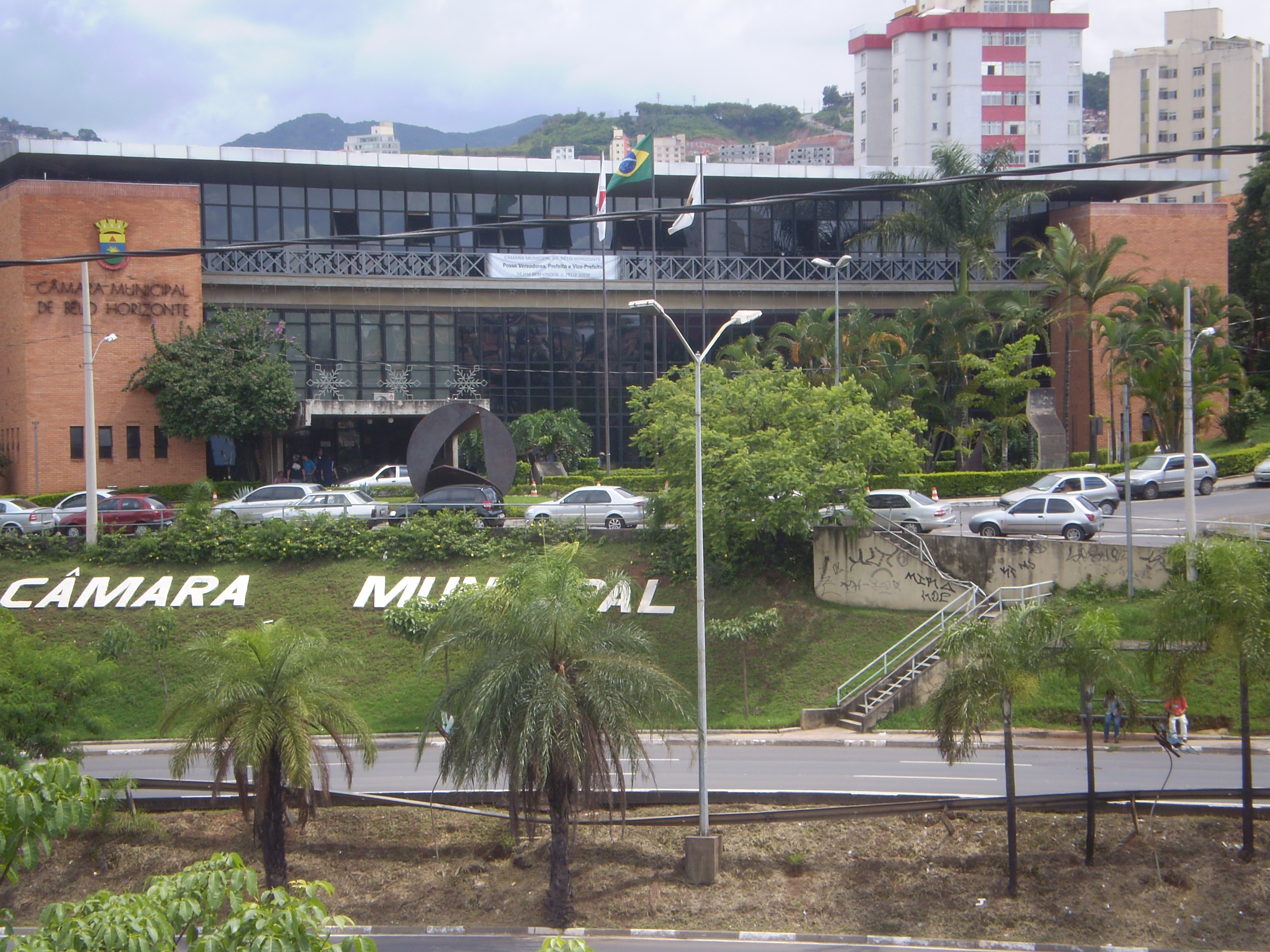 Câmara Municipal de Belo Horizonte, Belo Horizonte, Minas Gerais, Brasil.